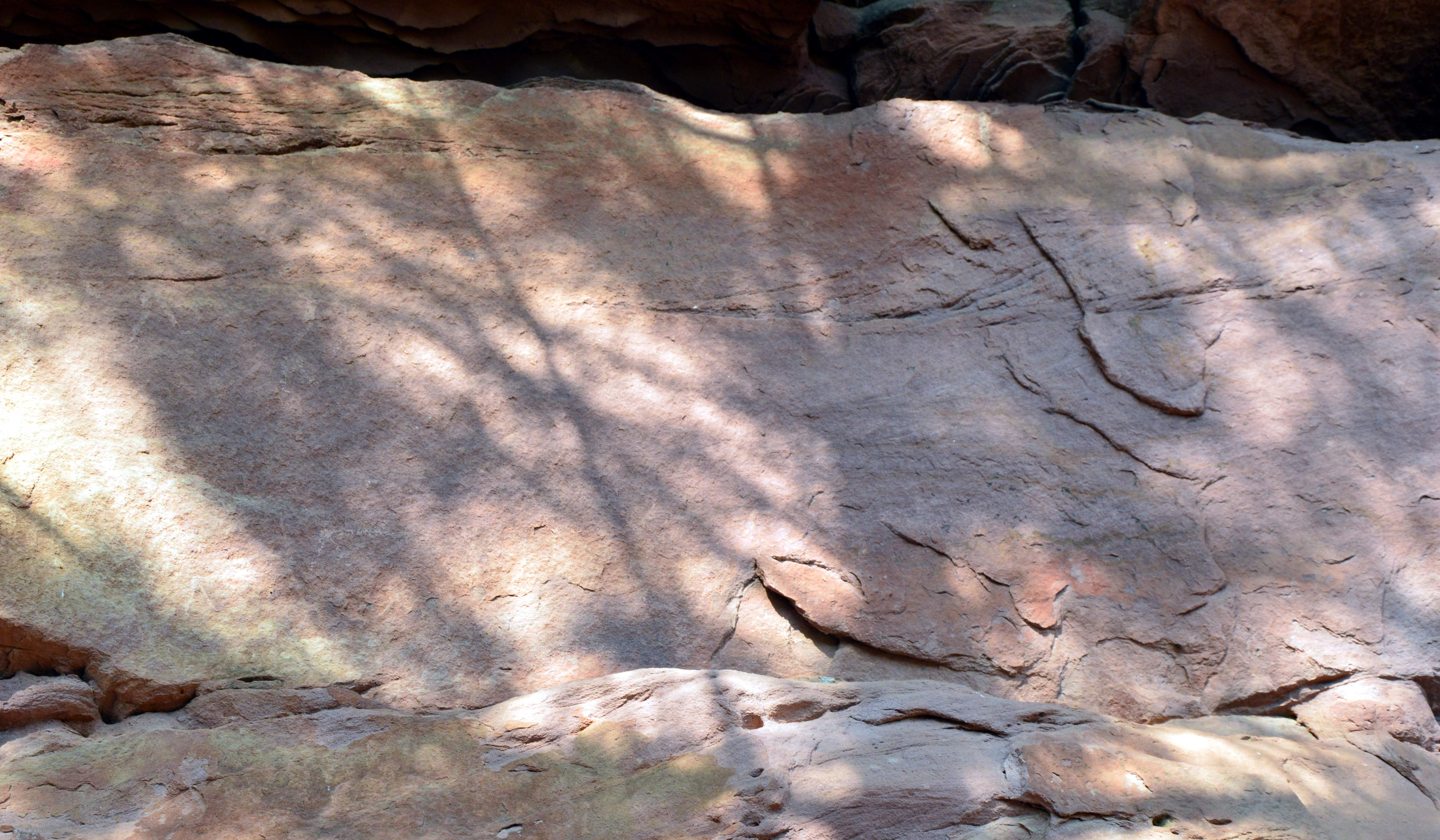 Detalle de panel decorado en el Abrigo de la Hoya de los Navarejos I en el Rodeno de Tormón (Teruel), Parque Cultural de Albarracín (2018).